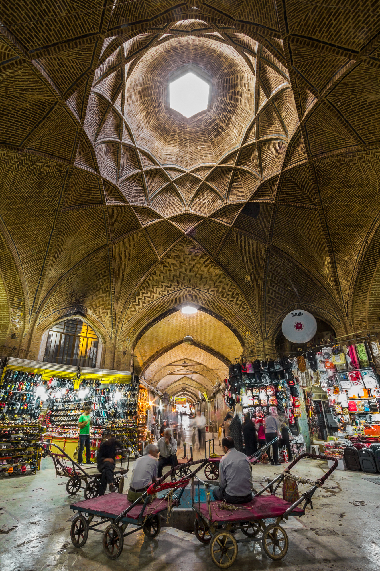 مجموعه بازار اراک